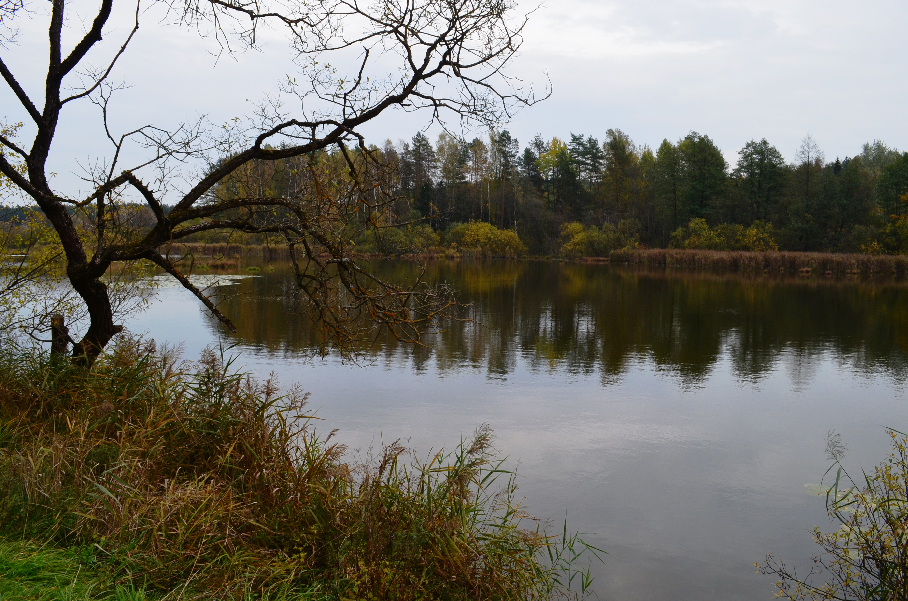 Bevardis ežerėlis į šiaurę nuo Dvarčionių, Vilnius